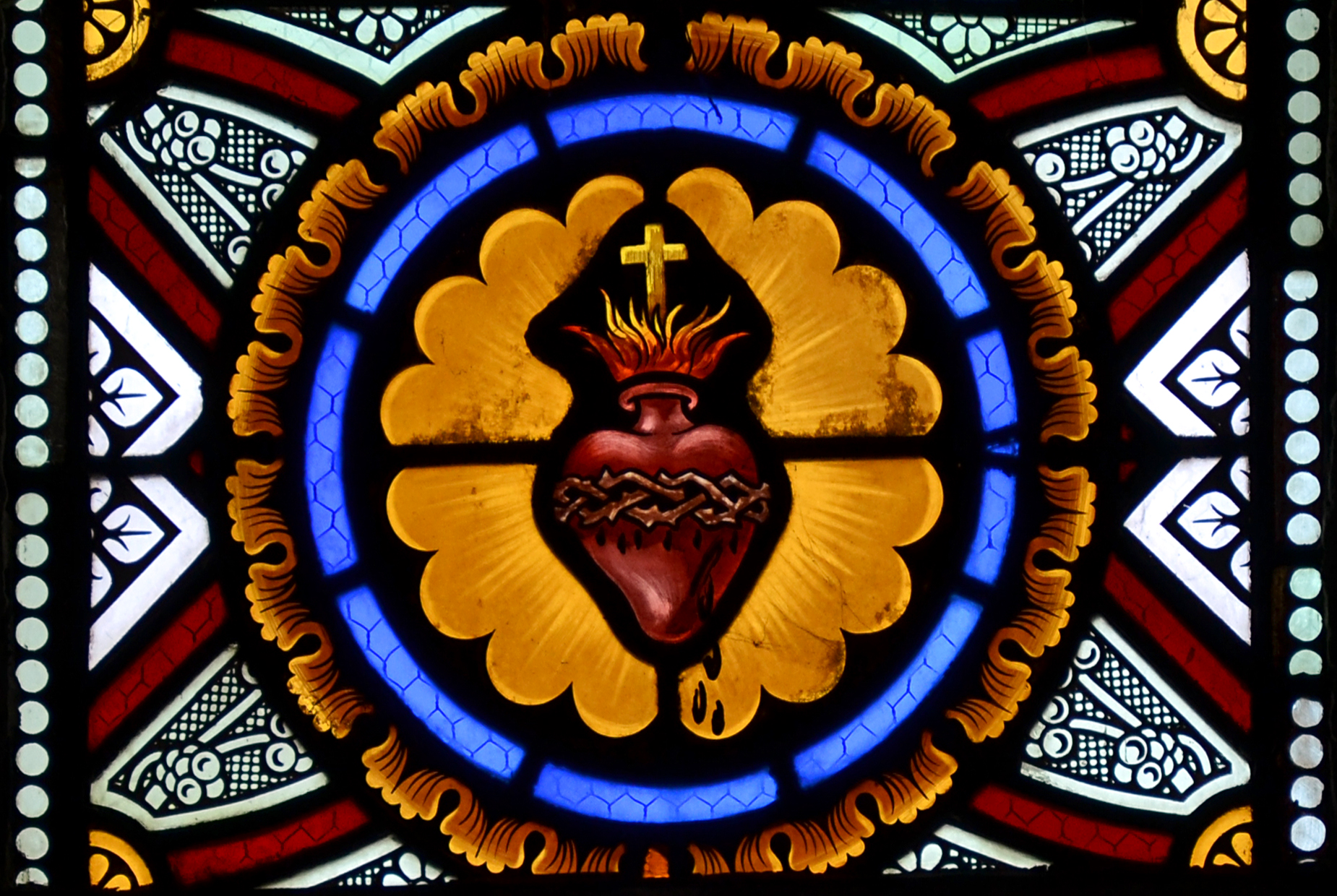 Un vitrail de l'église de Bugarach : le Sacré-Coeur.